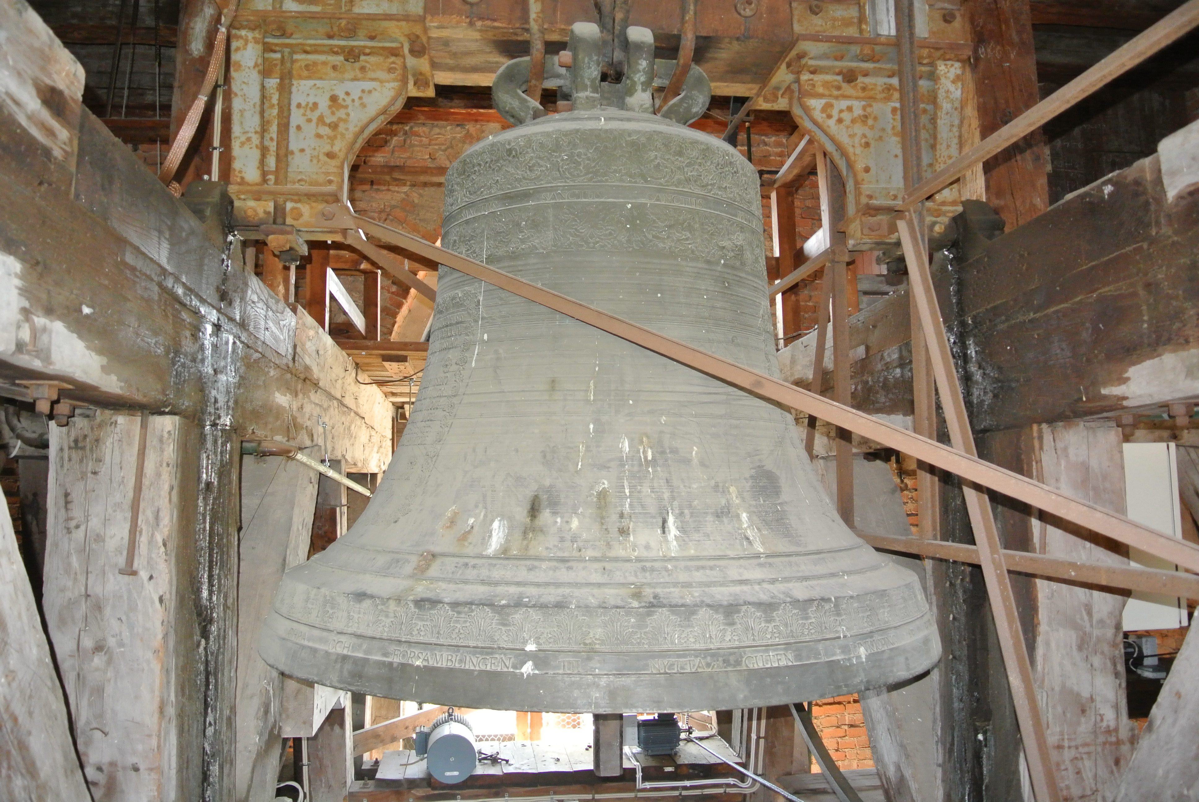 Storklockan i Linköpings domkyrka.